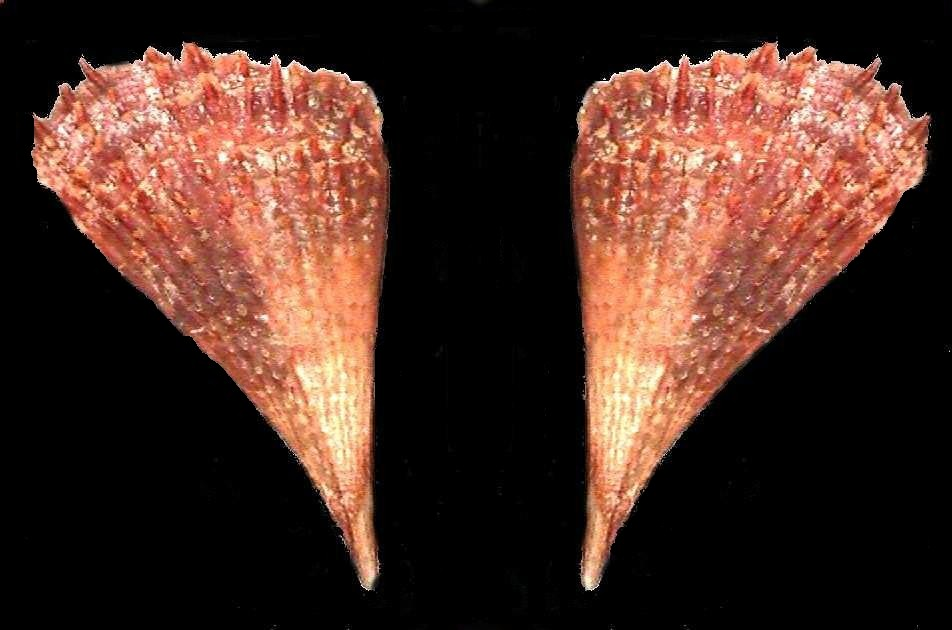 Foto de Pinna carnea (Bivalvia, Filibranchia, Pinnidae)